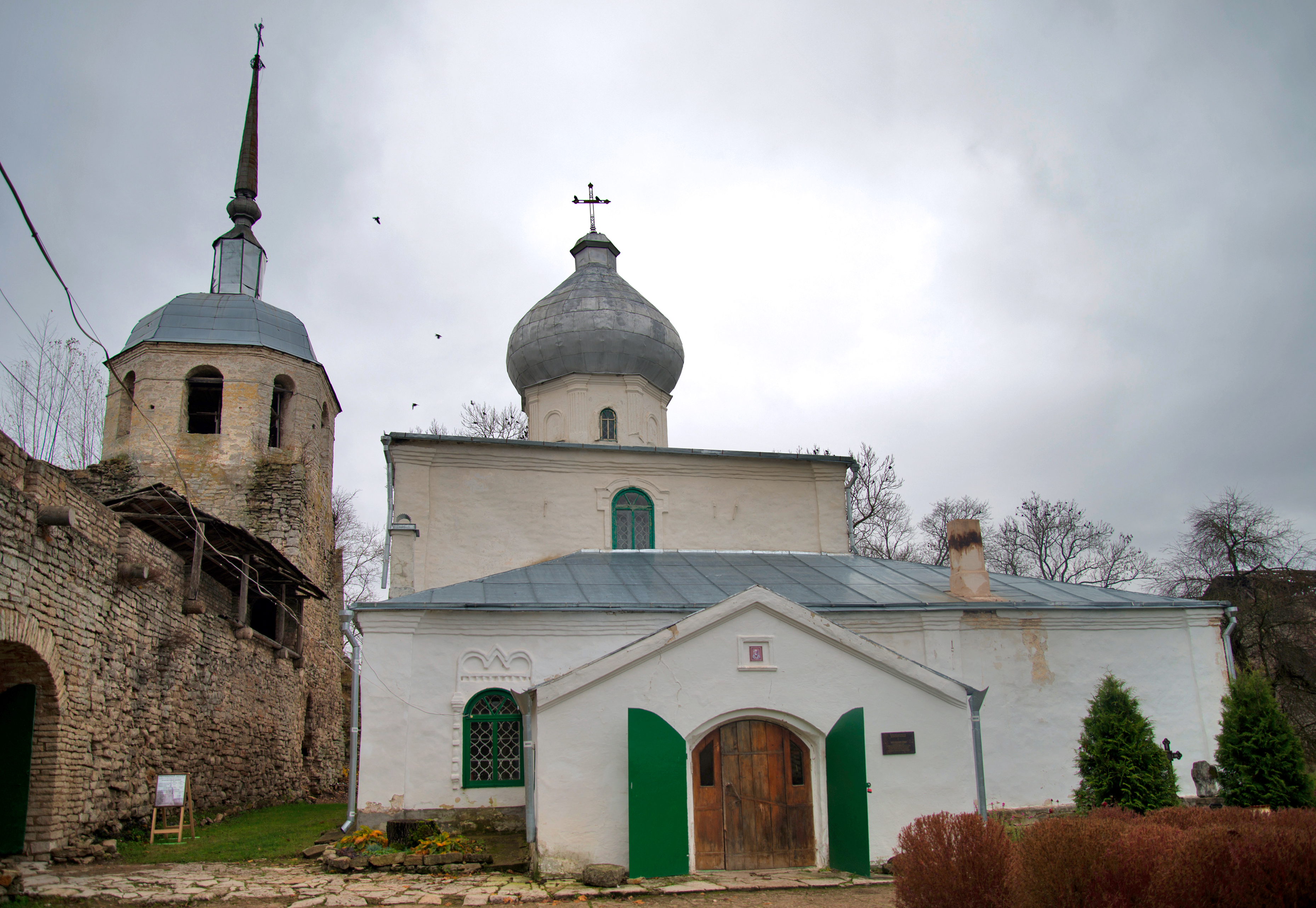 Никольская церковь с колокольней (Псковская область, Порхов, (на территории крепости))